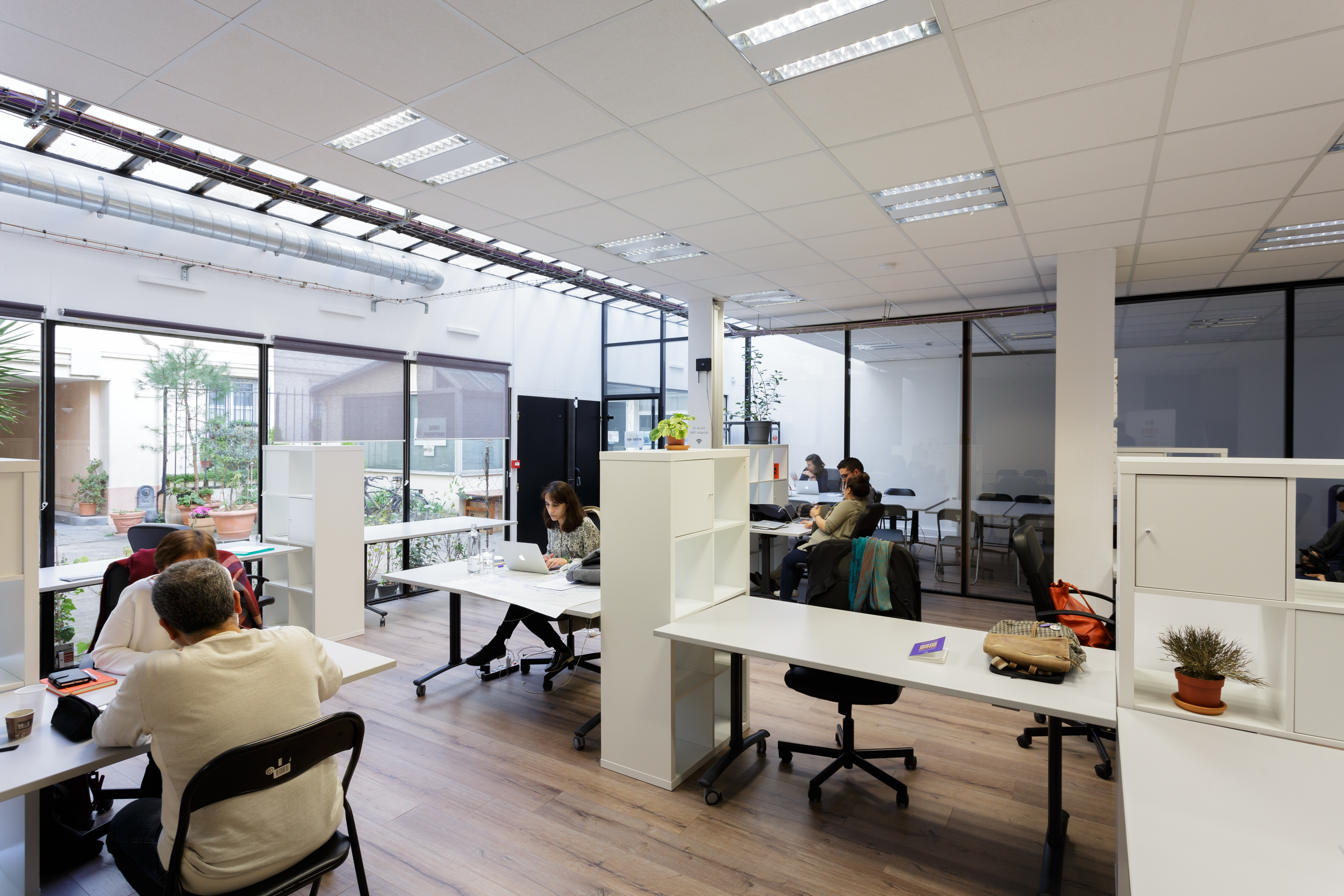 Le lumineux espace de co-working de Kiwanda avec ces bureaux et meubles de rangement.